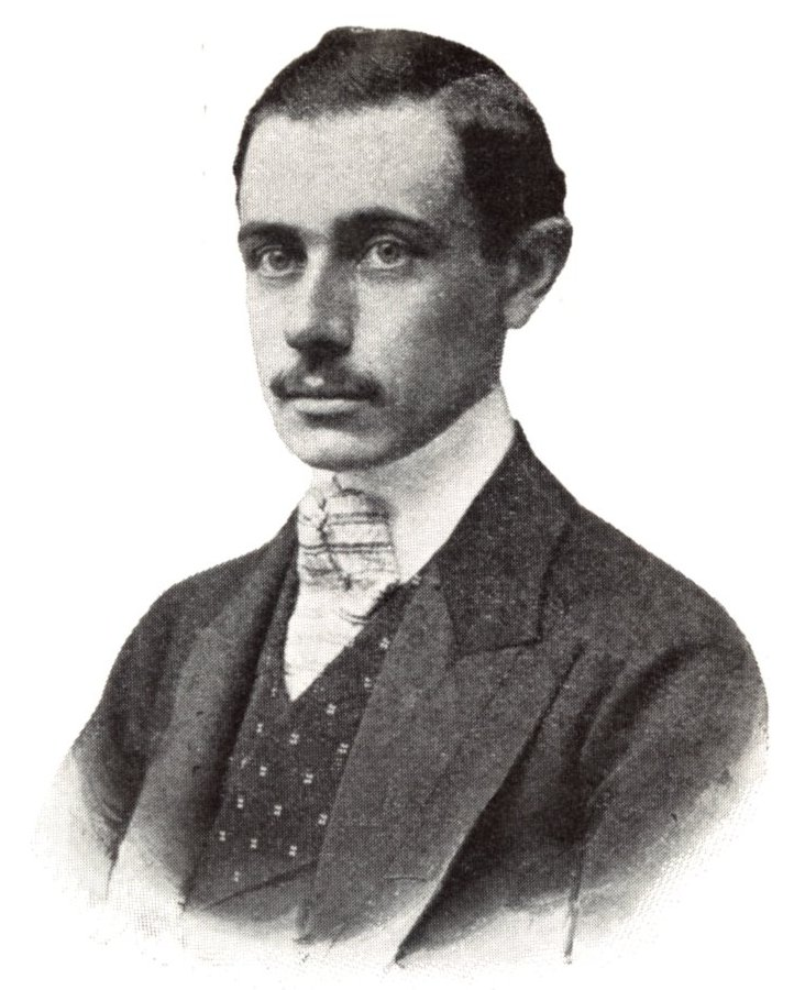 Teleki Pál (1879-1941) politikus, miniszterelnök, tiszteletbeli főcserkész